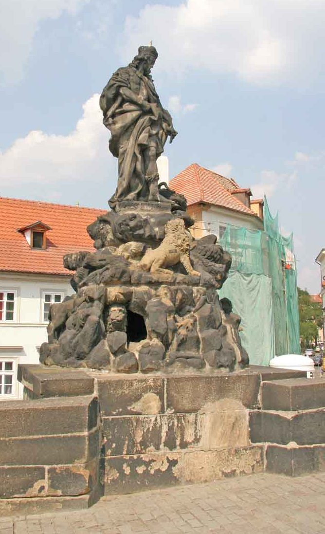 Sousoší Svatého Víta na Karlově mostě